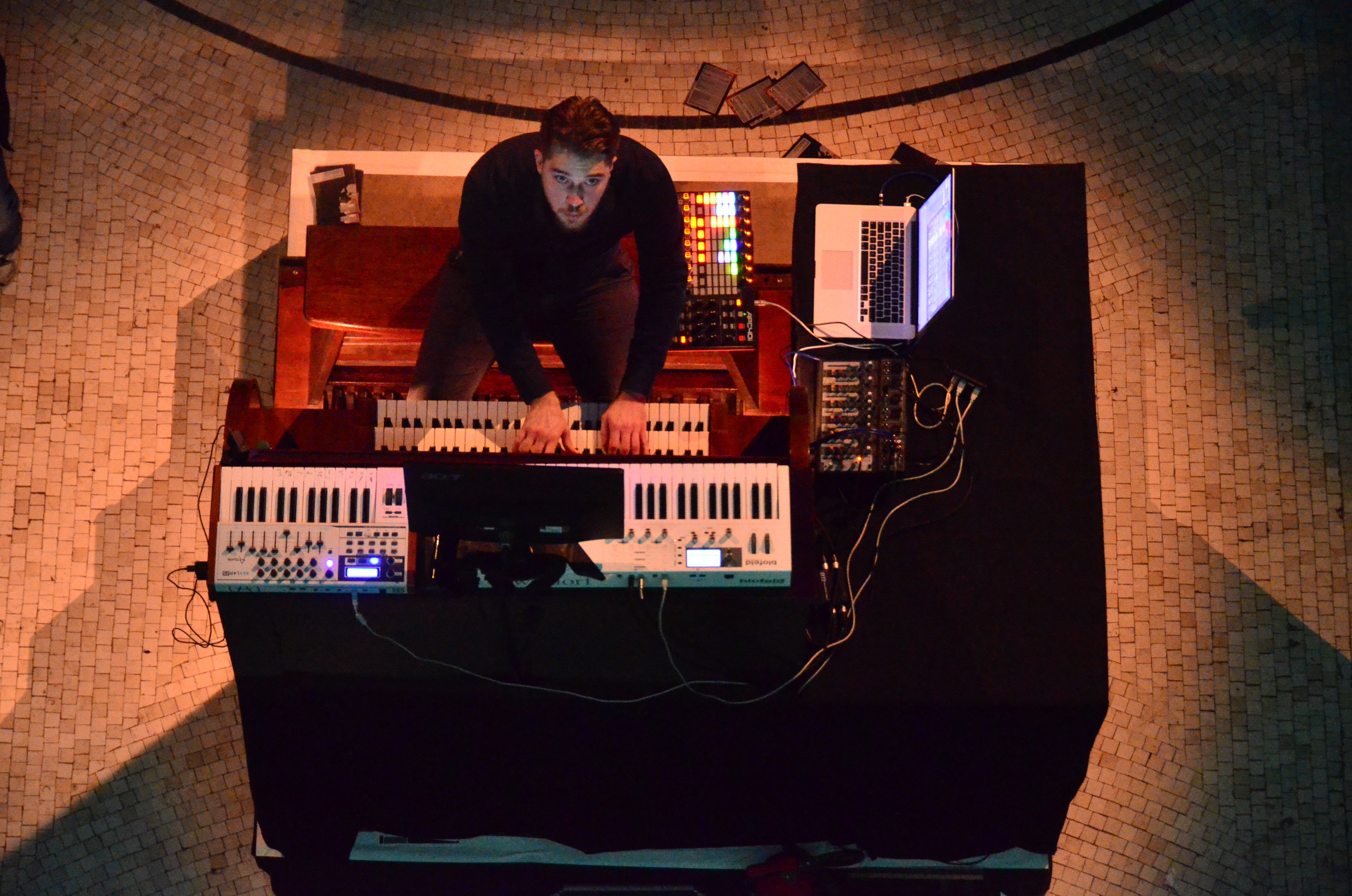 Orgel und Elektronik, Mathias Rehfeldt improvisiert Musik zu einem Stummfilm